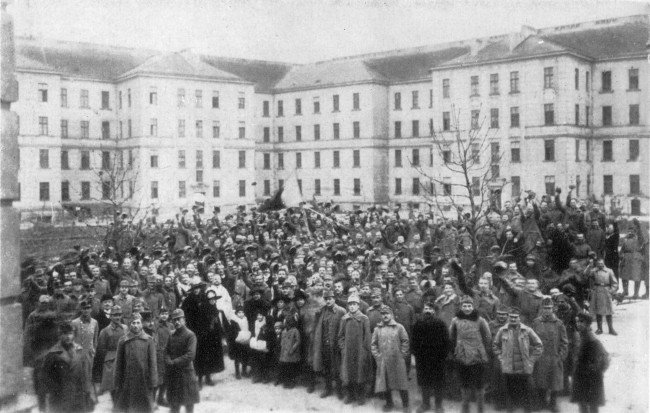 17 noiembrie 1918, depunerea Jurământului de credință față de România, a militarilor hunedoreni din Viena